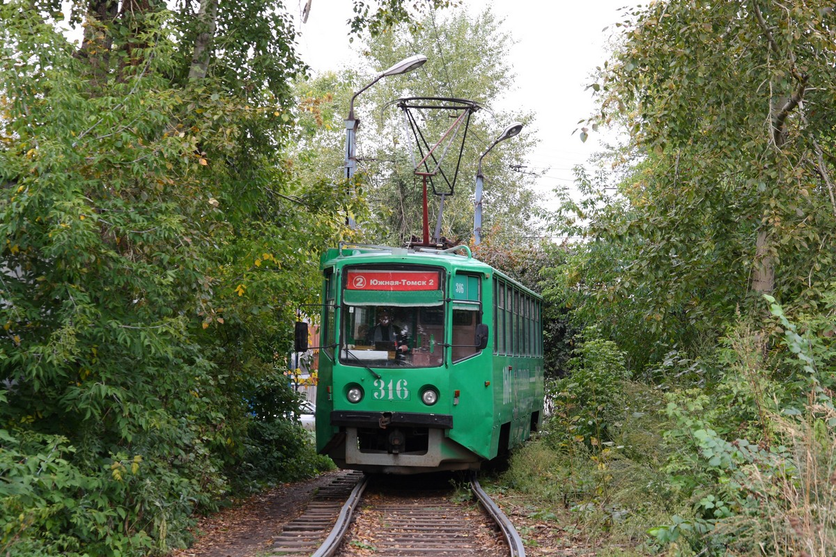 Трамвай на Томске-II. This image is related to the protected area of Russia number 7020202